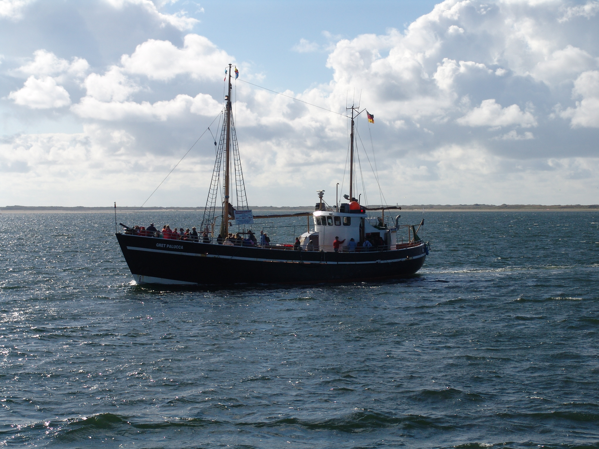 Ehemaliger Kriegsfischkutter der Wehrmacht; Jetzt als Ausflugsschiff unter dem Namen "Gret Palucca" im Einsatz.